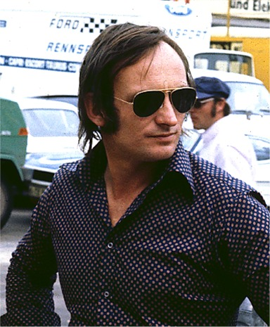 Chris Amon 1973 im Fahrerlager des Nürburgrings